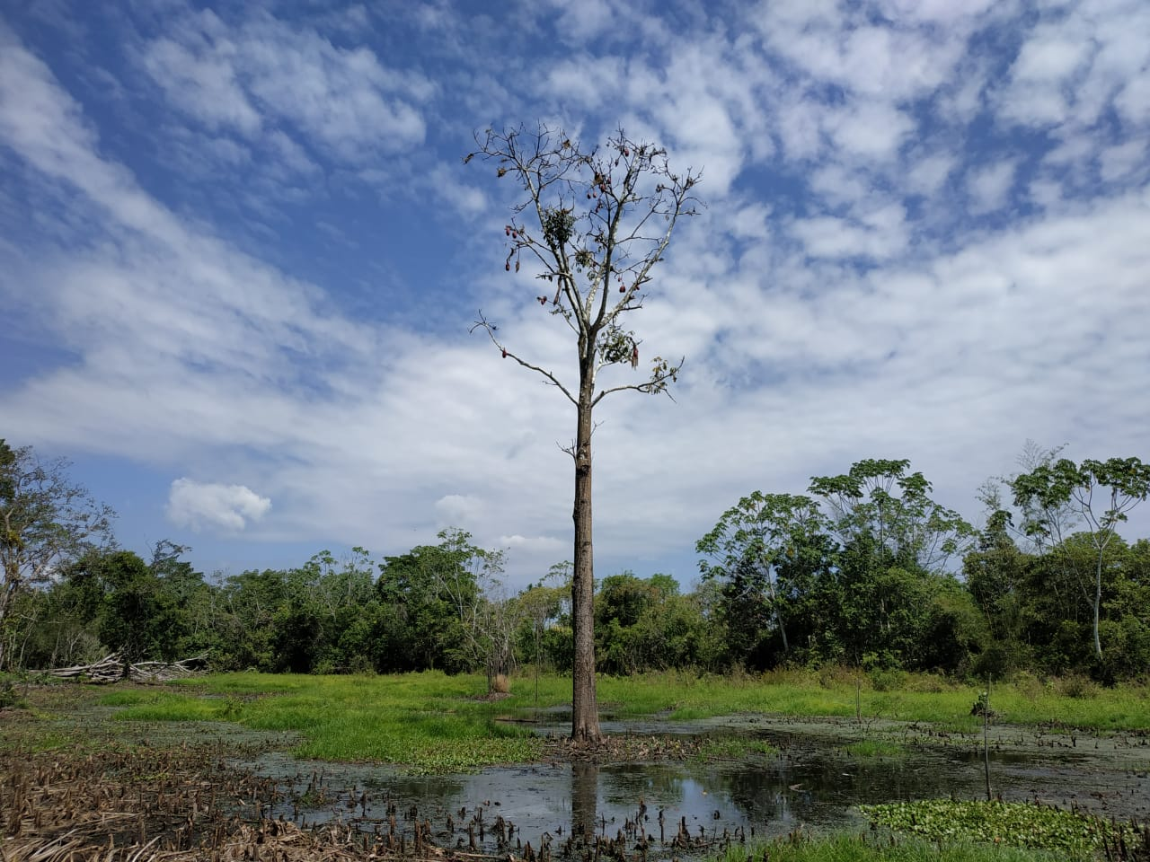 Humedal de la Madrevieja, La Macarena, Meta.